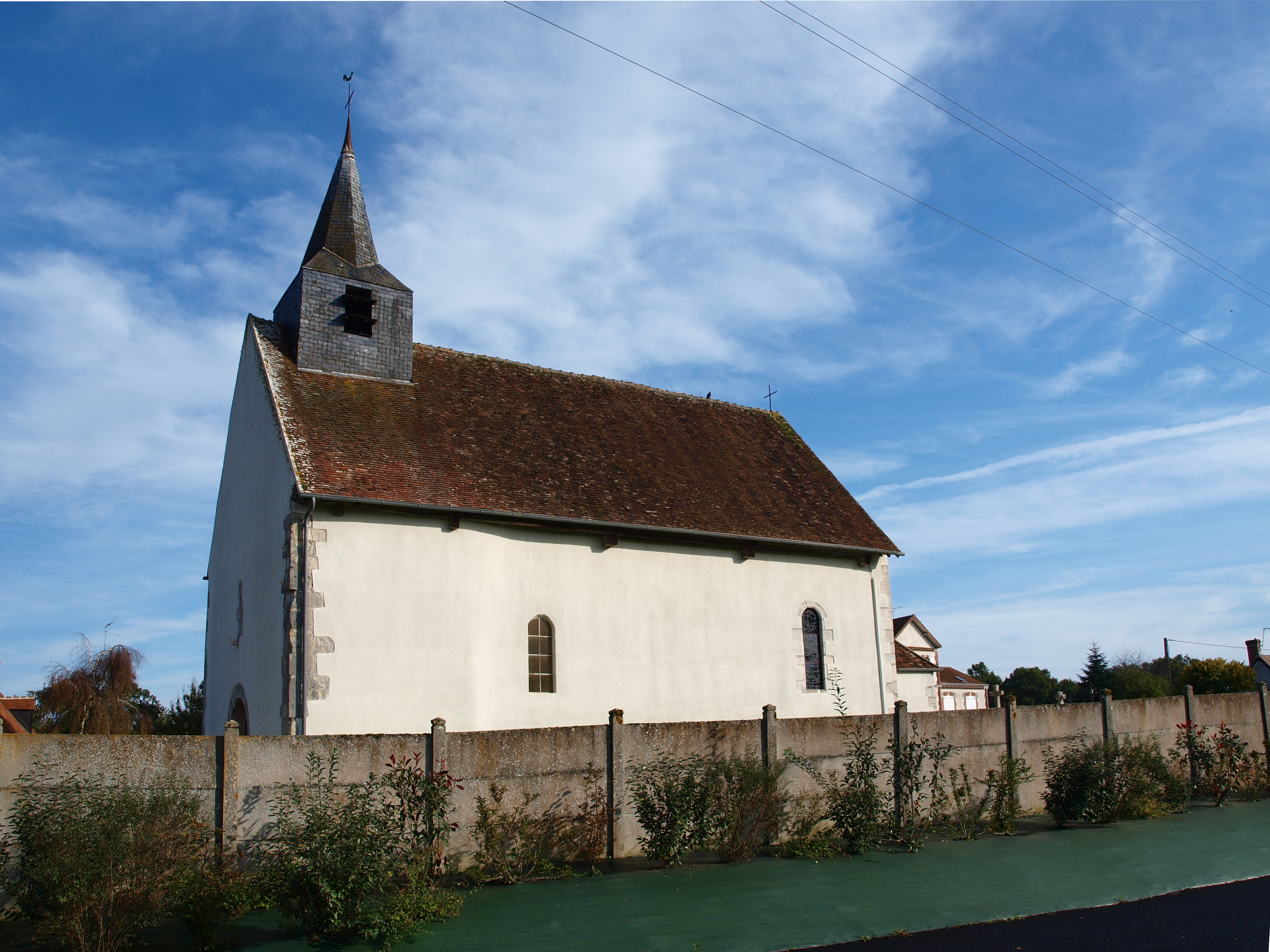 Feins-en-Gâtinais (Loiret, France) ; église